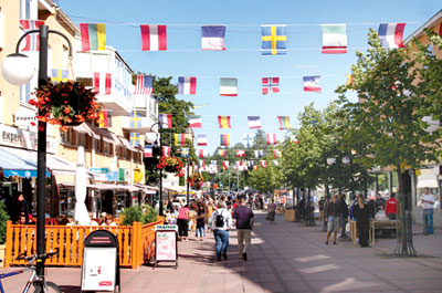 Bild från centrala Kramfors